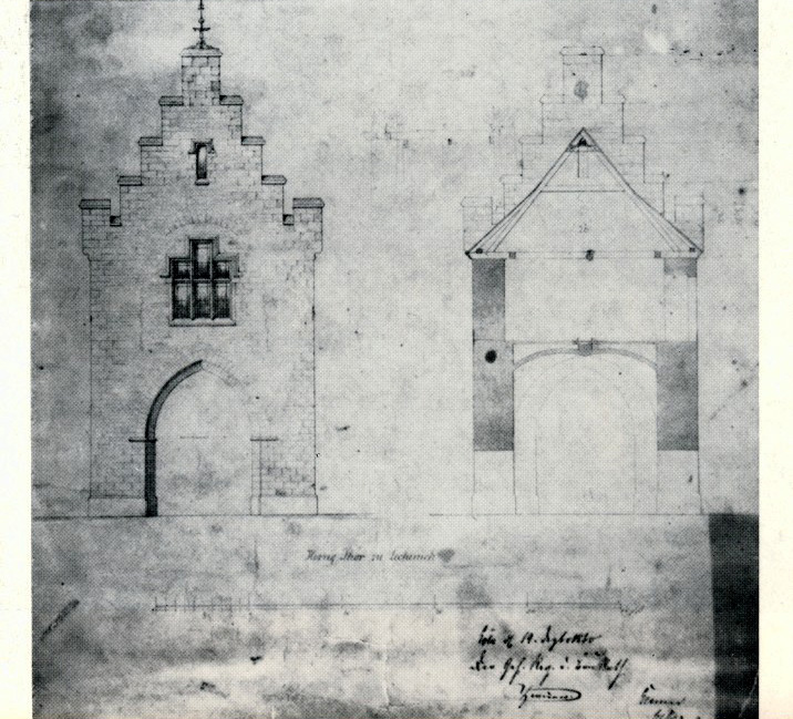 Lechenich Herriger Tor Entwurfzeichnung für den Umbau des Tores von dem Kölner Dombaumeister Zwirner 1860